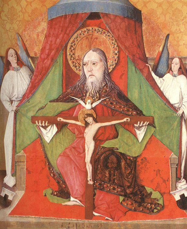 G. H. mester Szentháromság, Magyar Nemzeti Galéria, Budapest A trónus lépcsőjének legalsó szegélyén G 1471 H jelzés, a mester szignatúrája és az oltár készültének ideje, a lépcső két oldalán pedig Ernuszt János, a donátor, budai polgár címere látható, aki Mátyás király kincstartója volt, és 1470-ben lett Turóc vármegye főispánja. Ernuszt János a budavári Nagyboldogasszony-templom mellett, a cinteremben építtetett kápolnát, amelyet sírhelyéül szánt. 1476-ban kelt végrendeletében bőkezűen gondoskodott a kápolnáról és az oltárok számára képekről. Feltételezhető, hogy GH mester főrangú udvari mecénása révén kapcsolatban állt az ország központjával, Budával, és így az oltár a teljességgel elpusztult budai táblaképfestészetre is fényt vet.